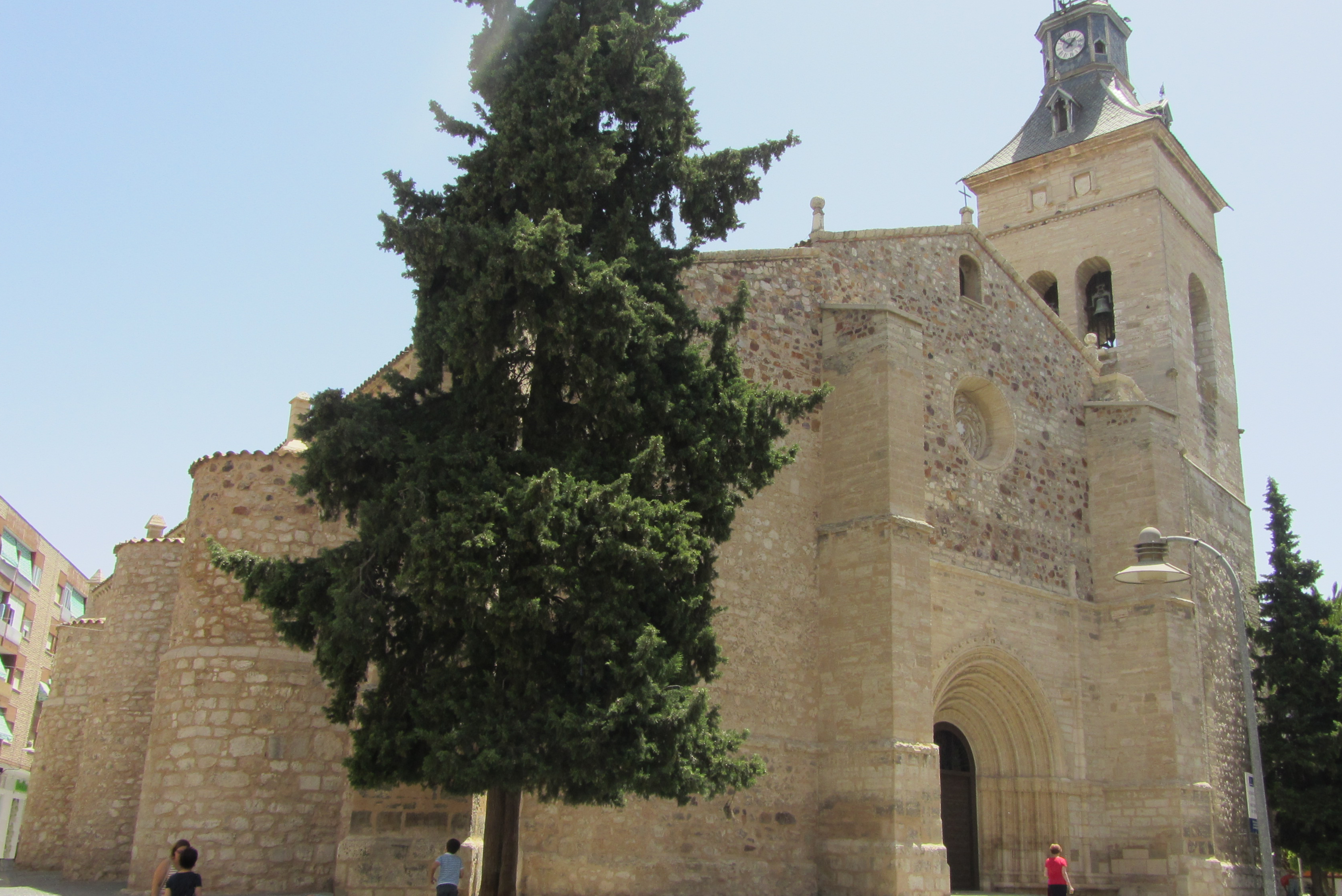 Fachadas norte y oeste de la Iglesia de San Pedro en Ciudad Real (España) de la segunda mitad del siglo XIV.